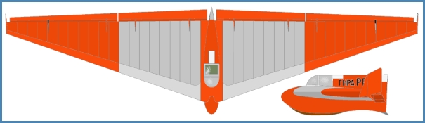 Tscheranovsky_BiTsch11